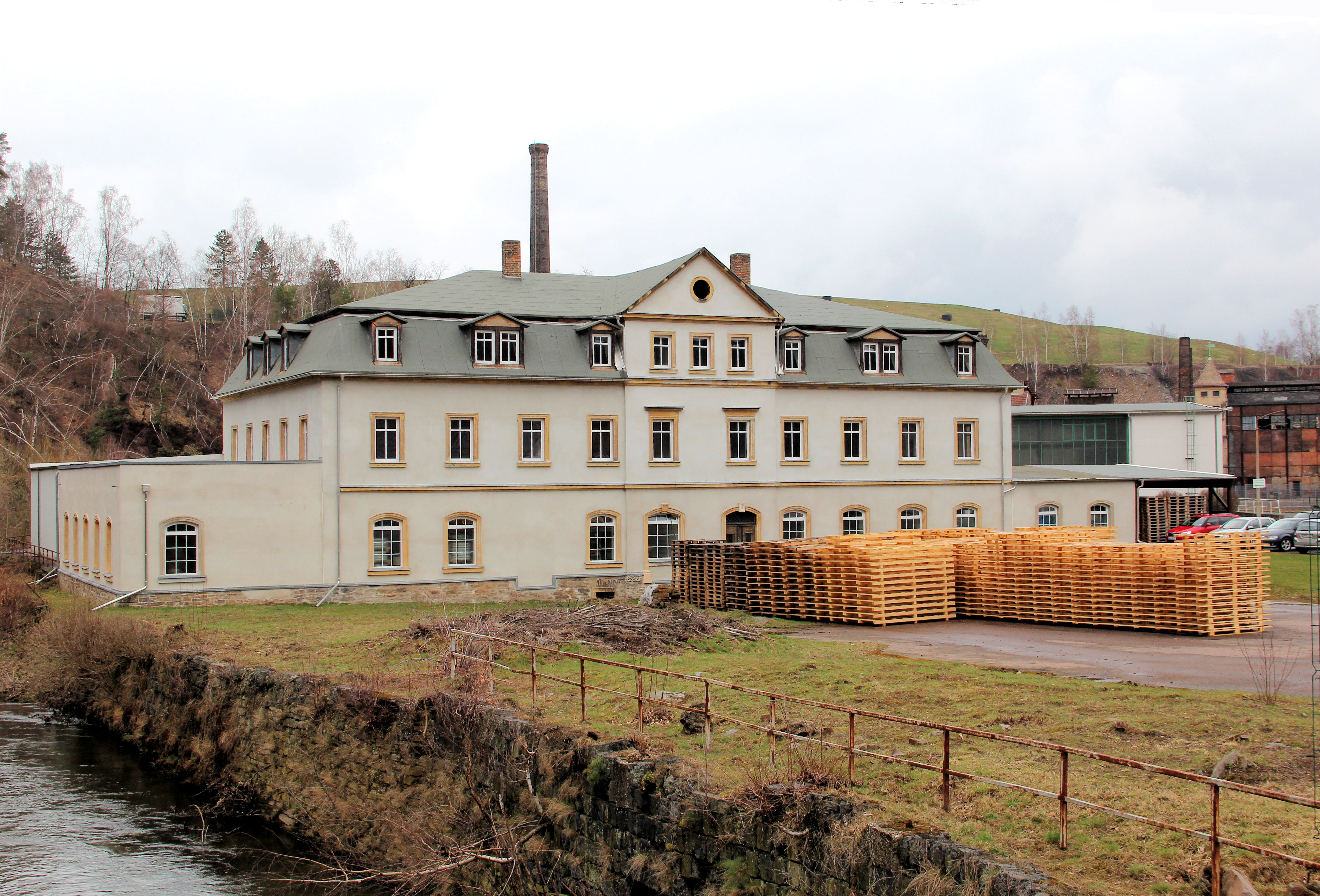 Ehemalige Münzstätte Muldenhütten im März 2019.